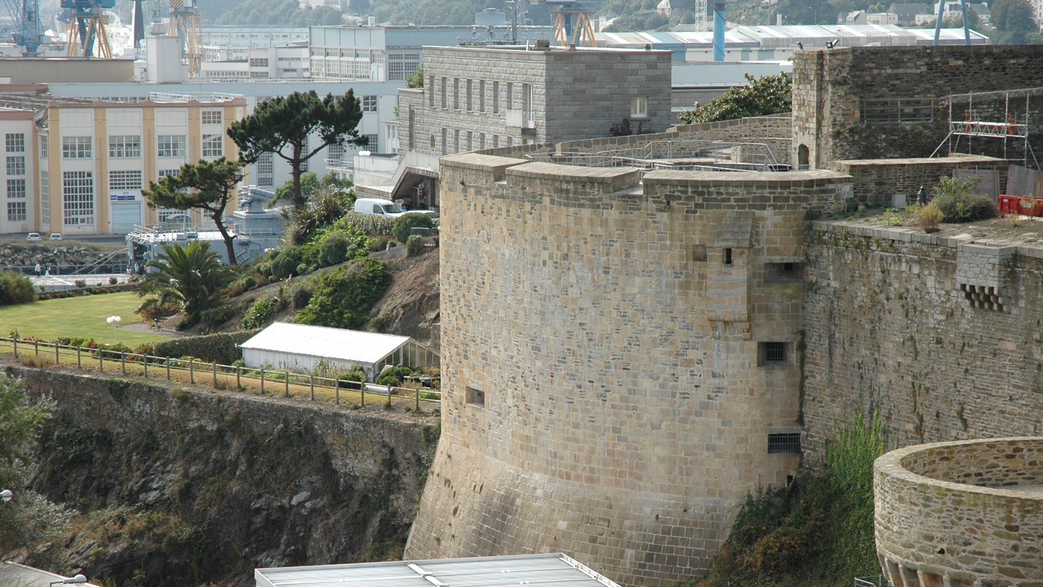 Tour du chateau de Brest - en arrière plan la résidence du prefet maritime.